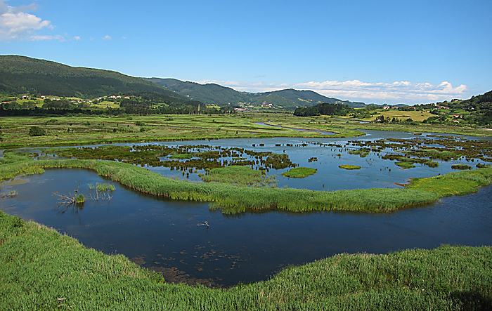 Humedal de Orueta en Gautegiz Arteaga, frente a Urdaibai Bird Center.